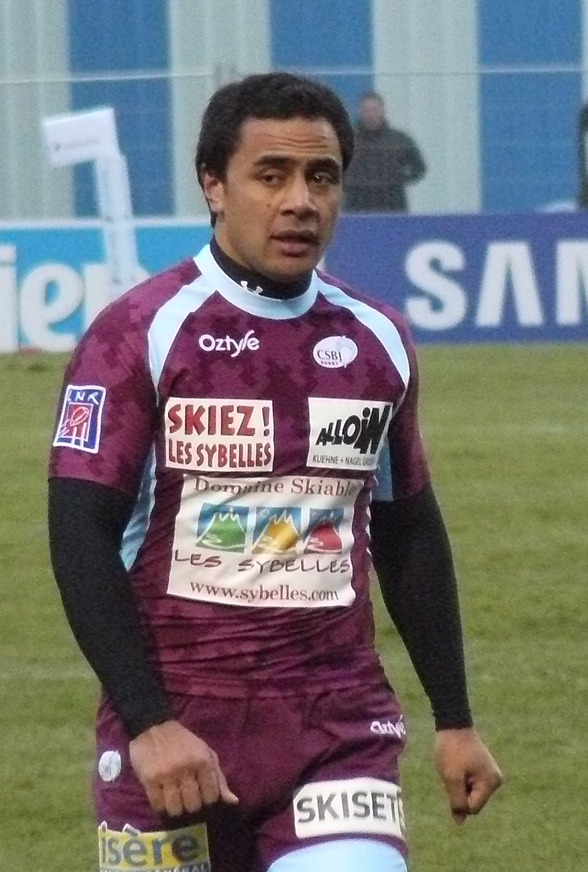 John Senio, joueur du CS Bourgin-Jallieu, lors du match contre le Racing Métro 92, le 3 janvier 2010 à Colombes.